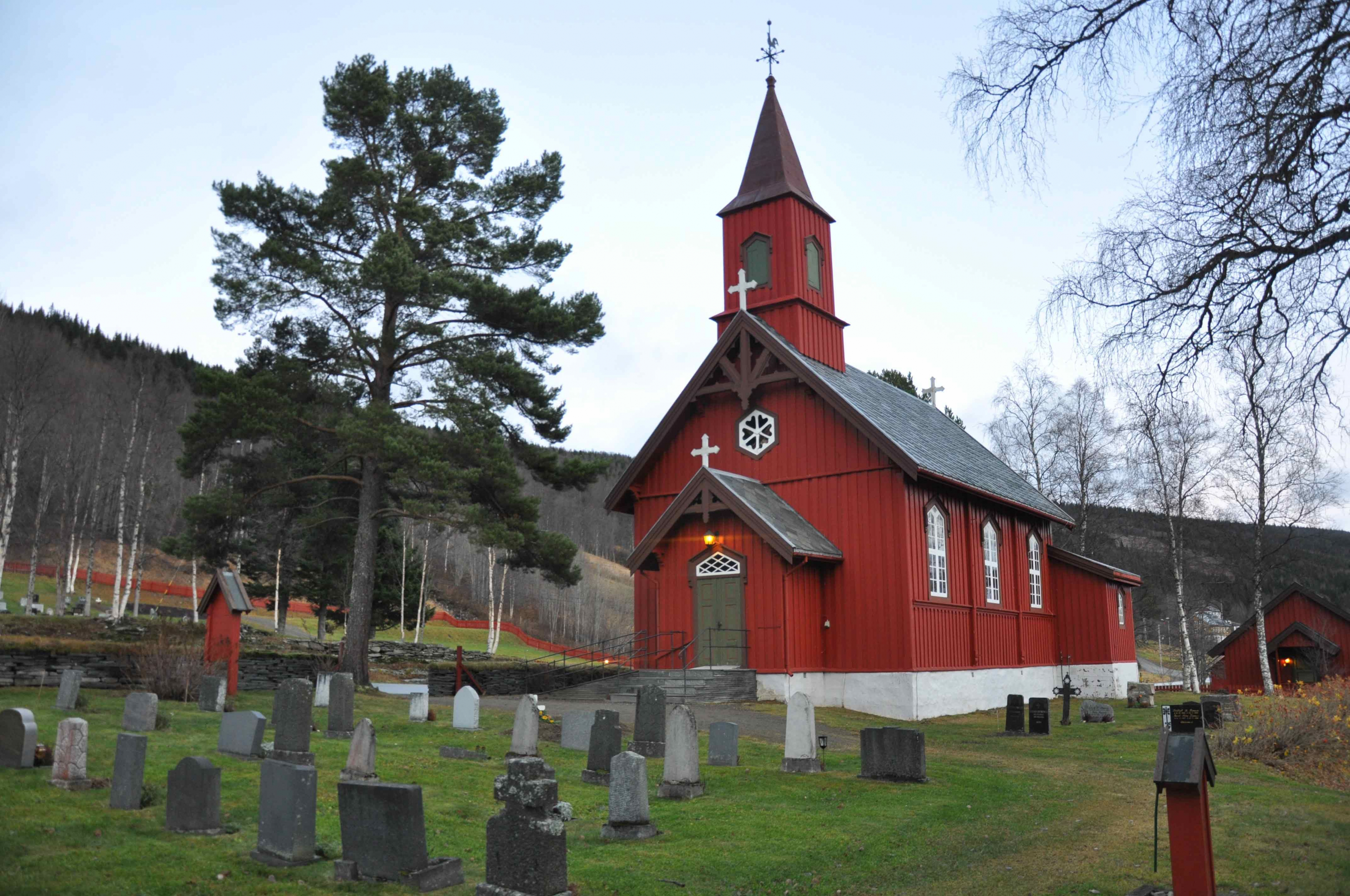 Sørli kirke. Foto: Nic Furu/Riksantikvaren.